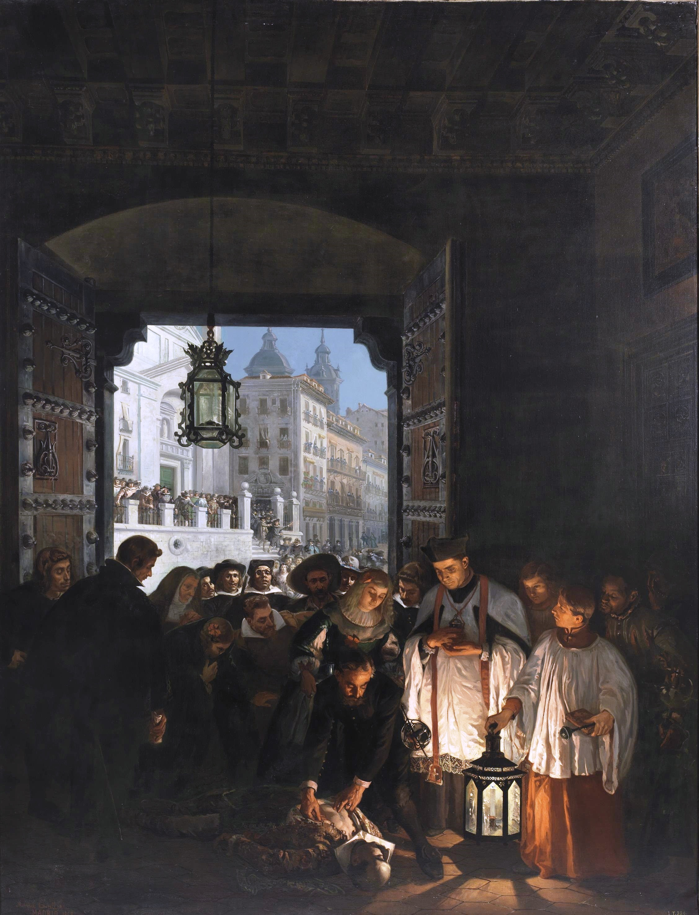 La obra representa el momento en que el pueblo madrileño contempló el cadáver de Juan de Tassis y Peralta (1582-1622), conde de Villamediana, ya que después de su asesinato sus restos fueron llevado al portal del palacio del conde de Oñate, que era la residencia de Juan de Tassis y Acuña, primer conde de Villamediana y padre del difunto. El cadáver de este último aparece en la obra siendo contemplado por su padre y por el público allí congregado, ya que a dicho lugar, según se afirmó en la época, concurrió toda la Corte a ver la herida.